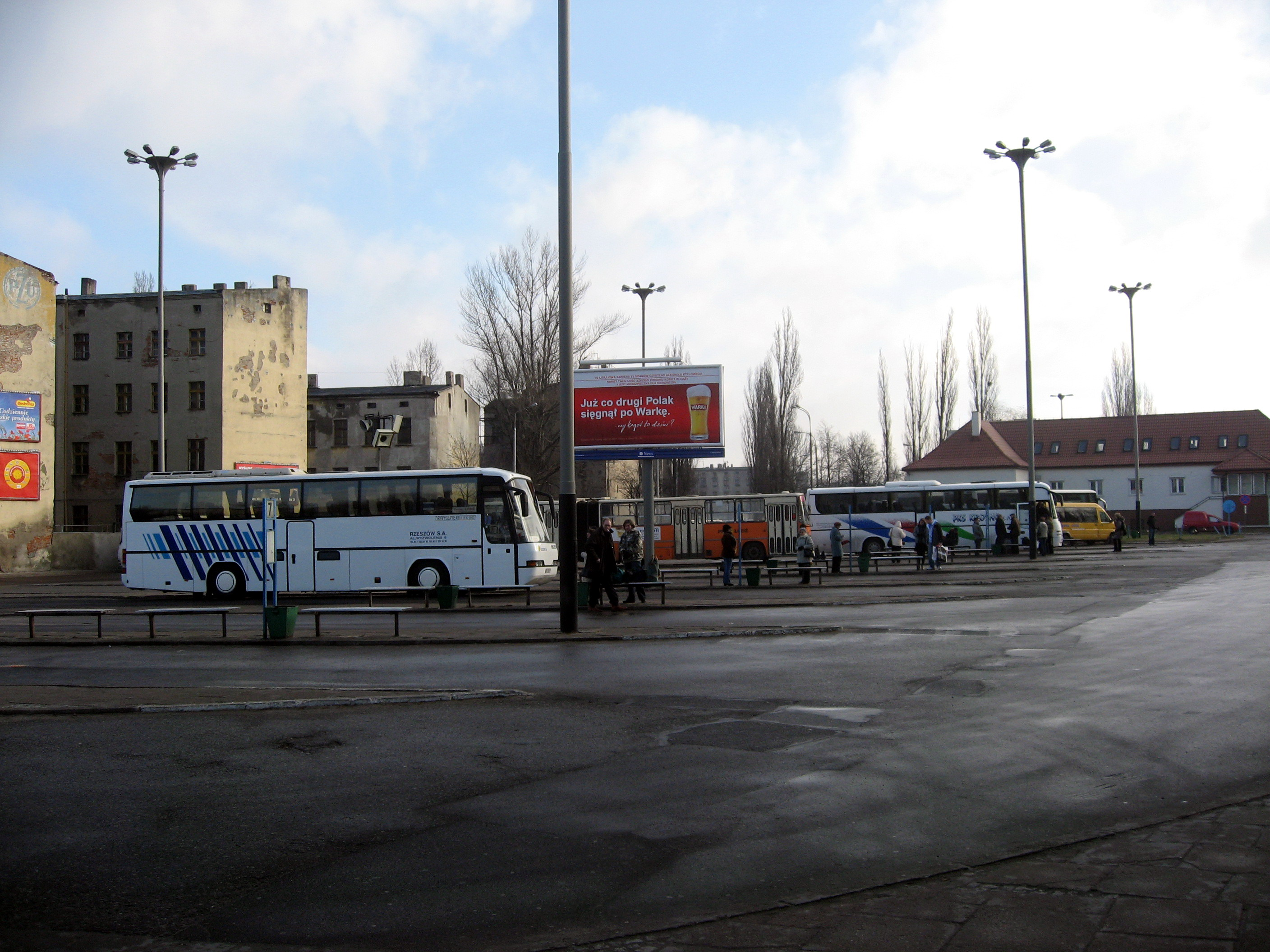 Łódź, autobusové nádraží.